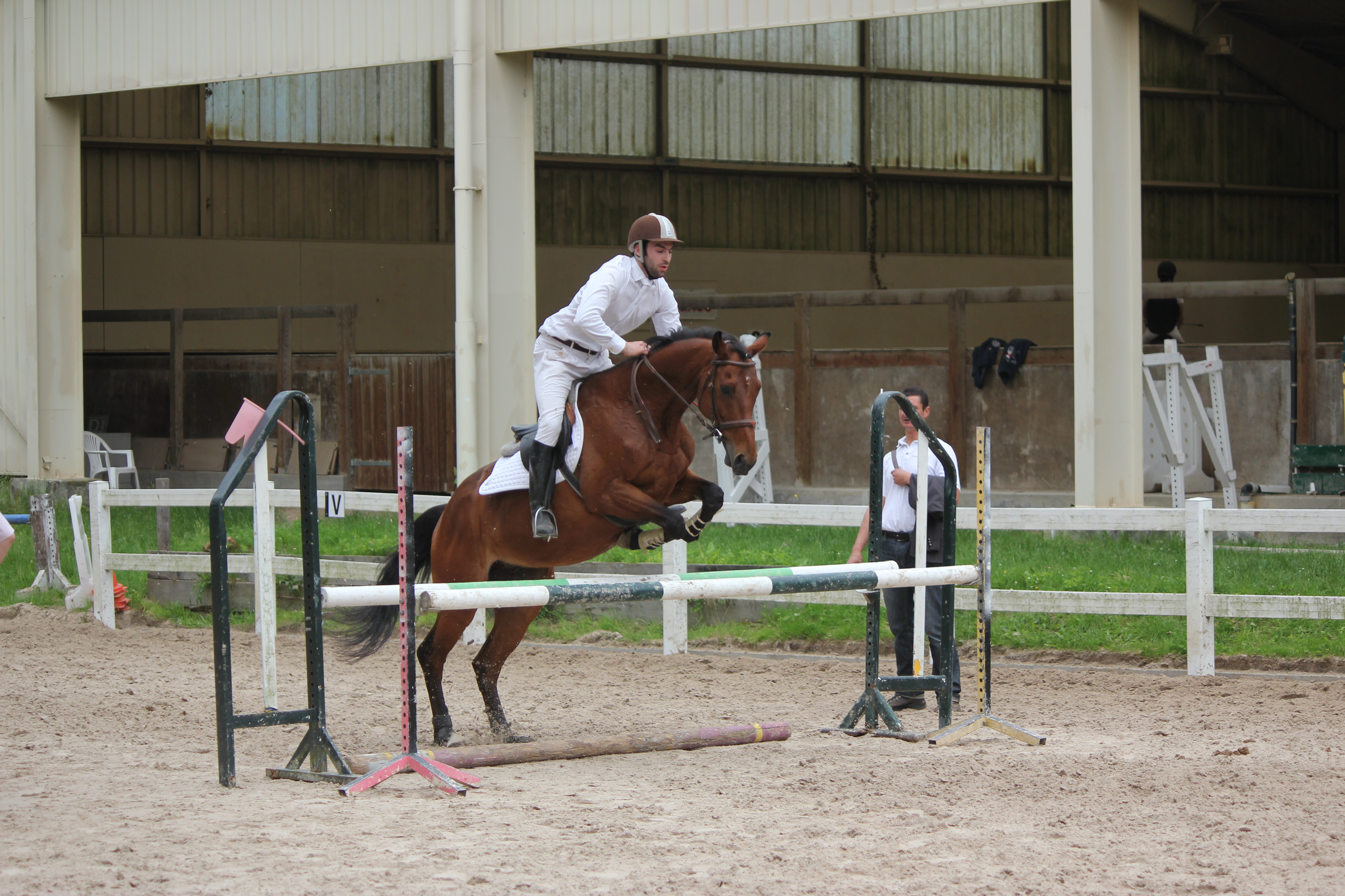 Padock concours de saut d'obstacle.